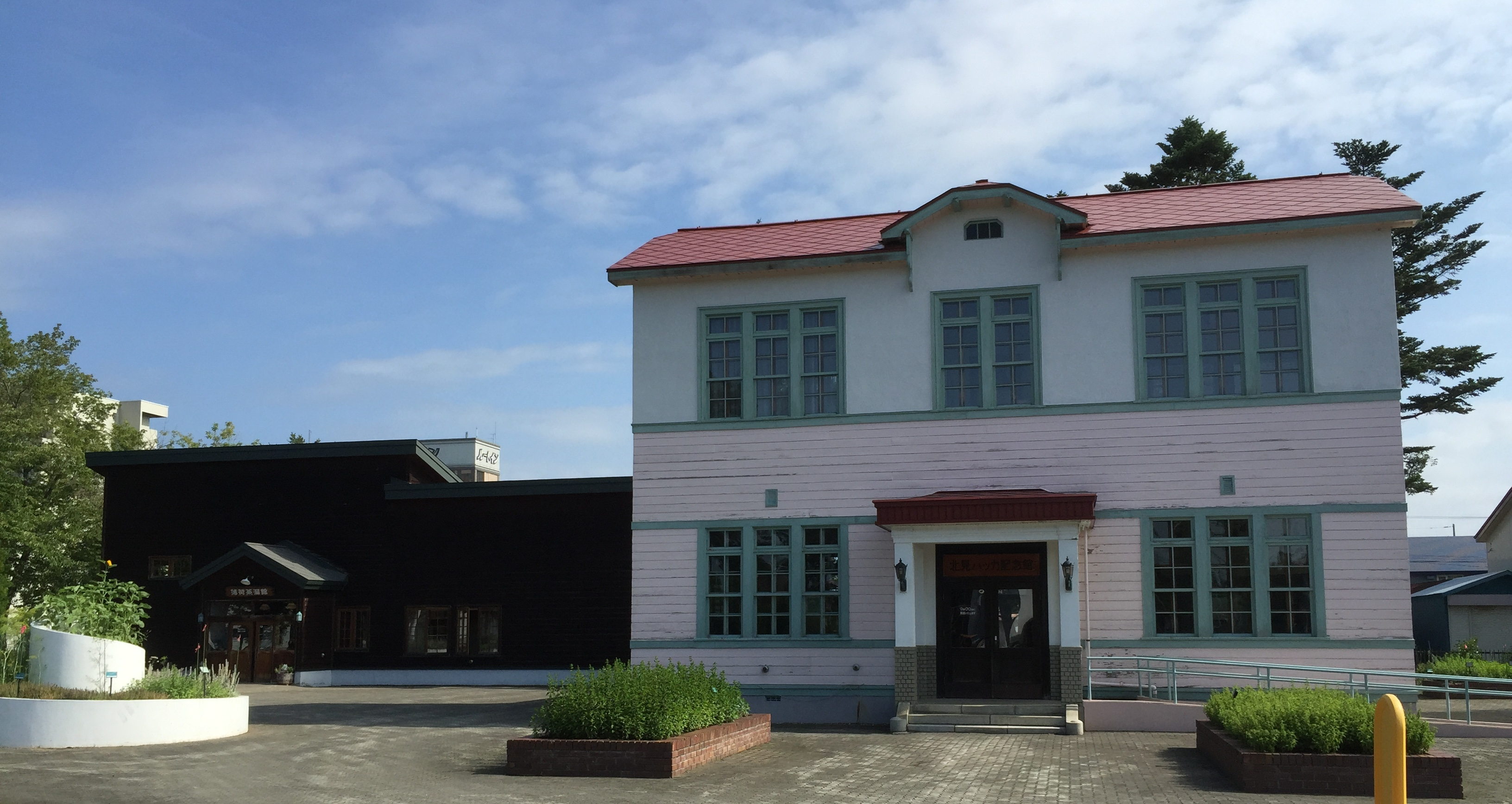 北見ハッカ記念館